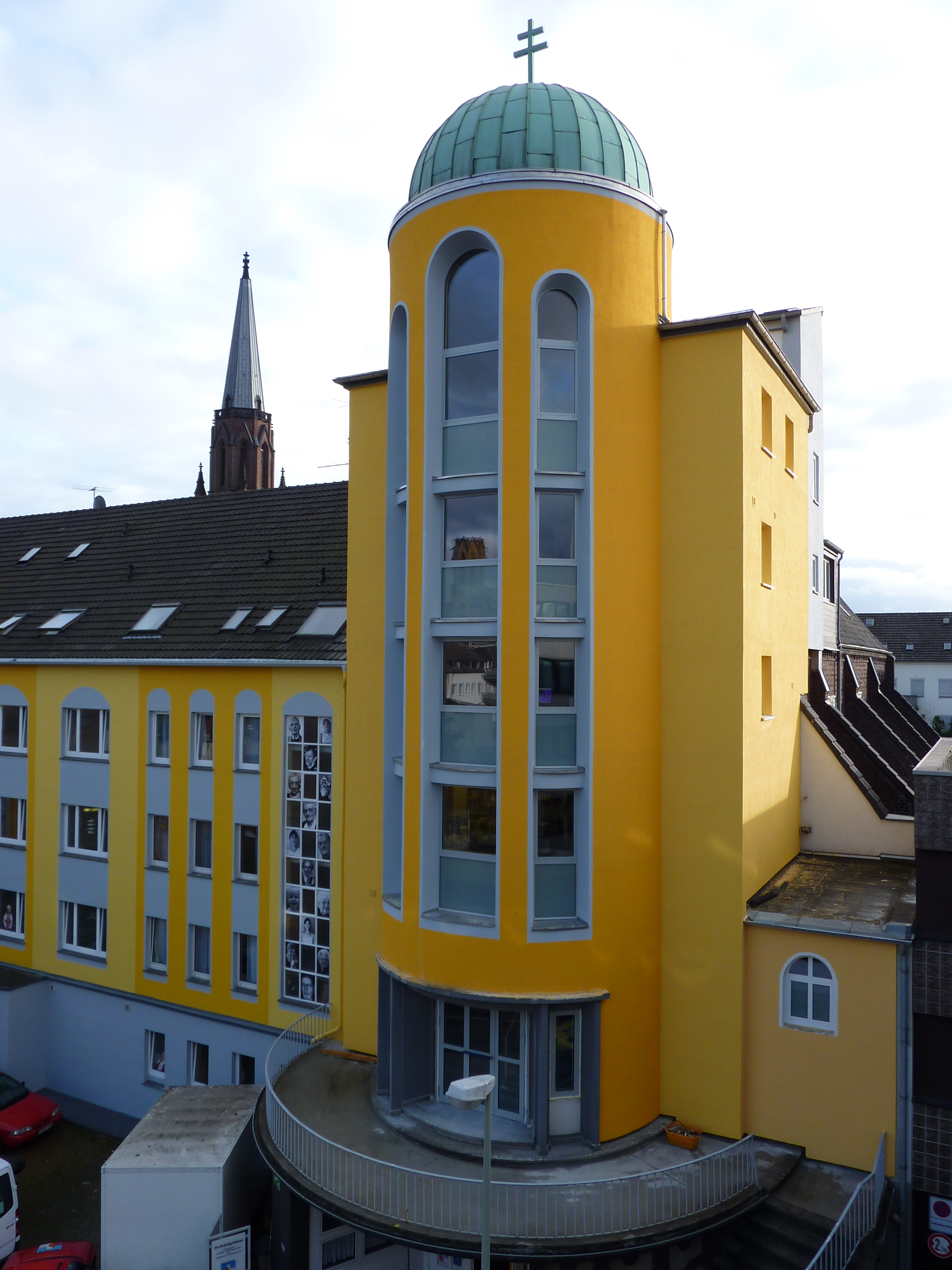 Die Pfarrkirche Erscheinung Christi, 1892–1894 erbaut als Christuskirche, durch Juni 1943 und Januar 1945 durch Bombenangriffe schwer beschädigt und bis November 1951 wieder in Stand gesetzt.